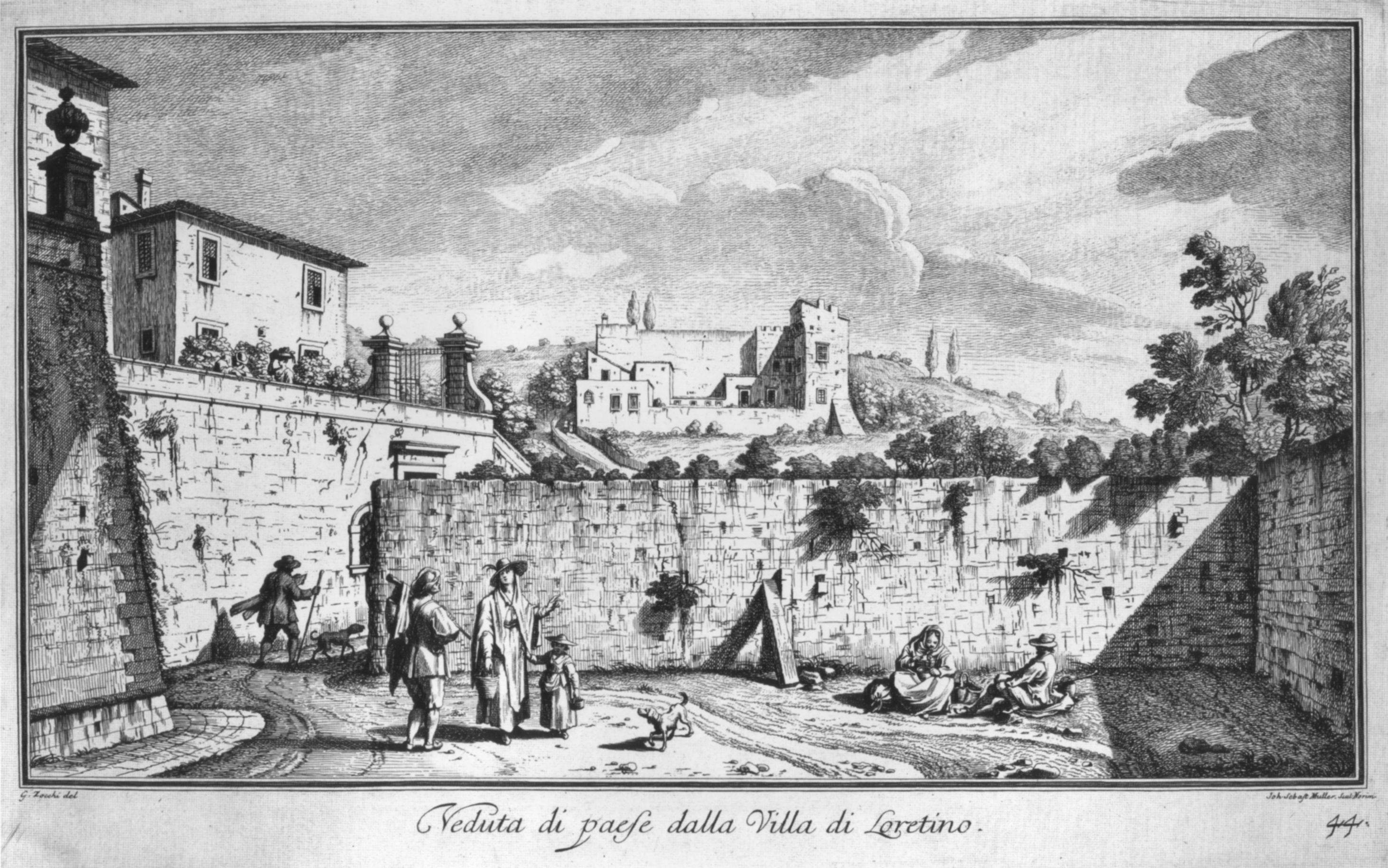 Zocchi, ville 46 loretino